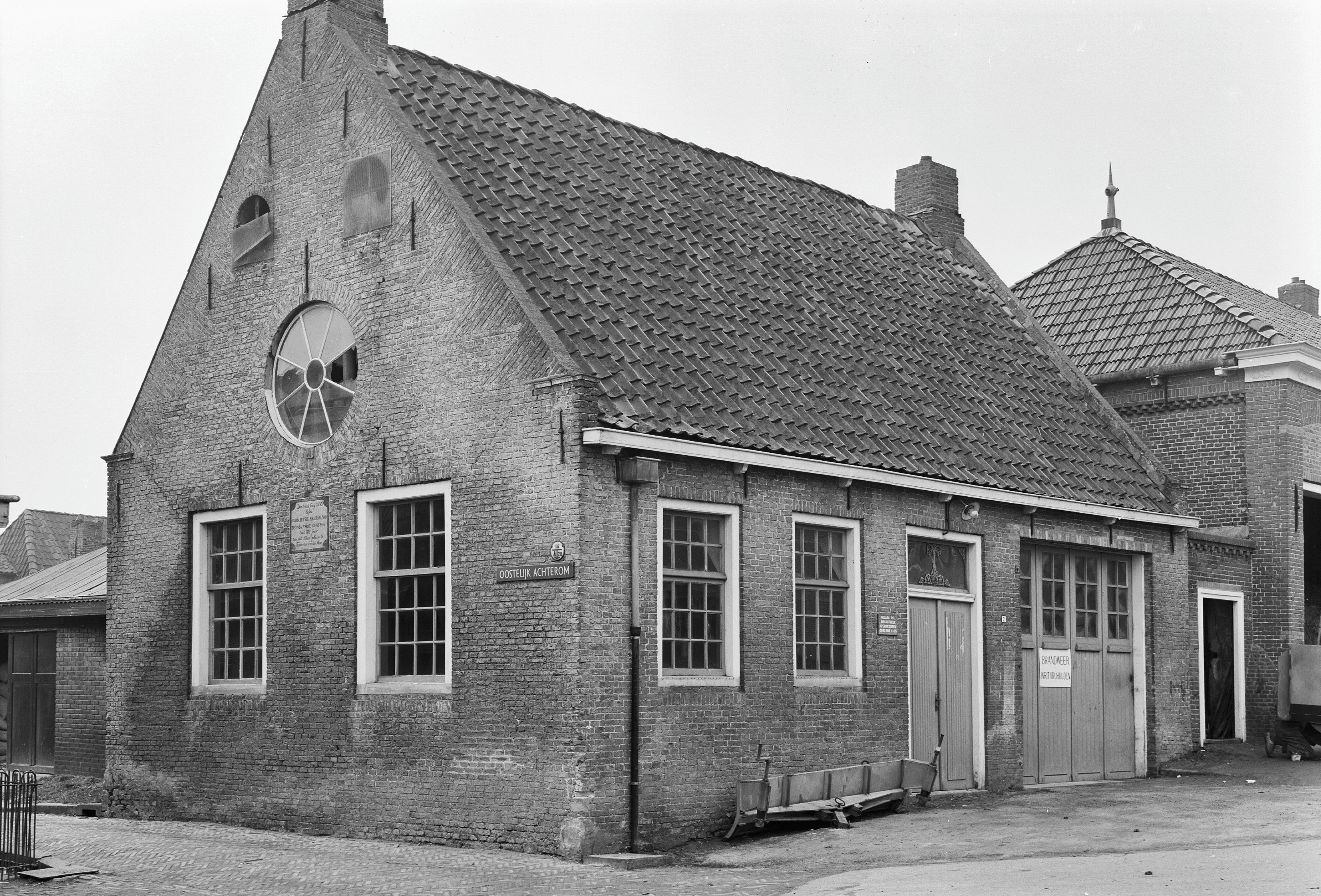 aanzicht